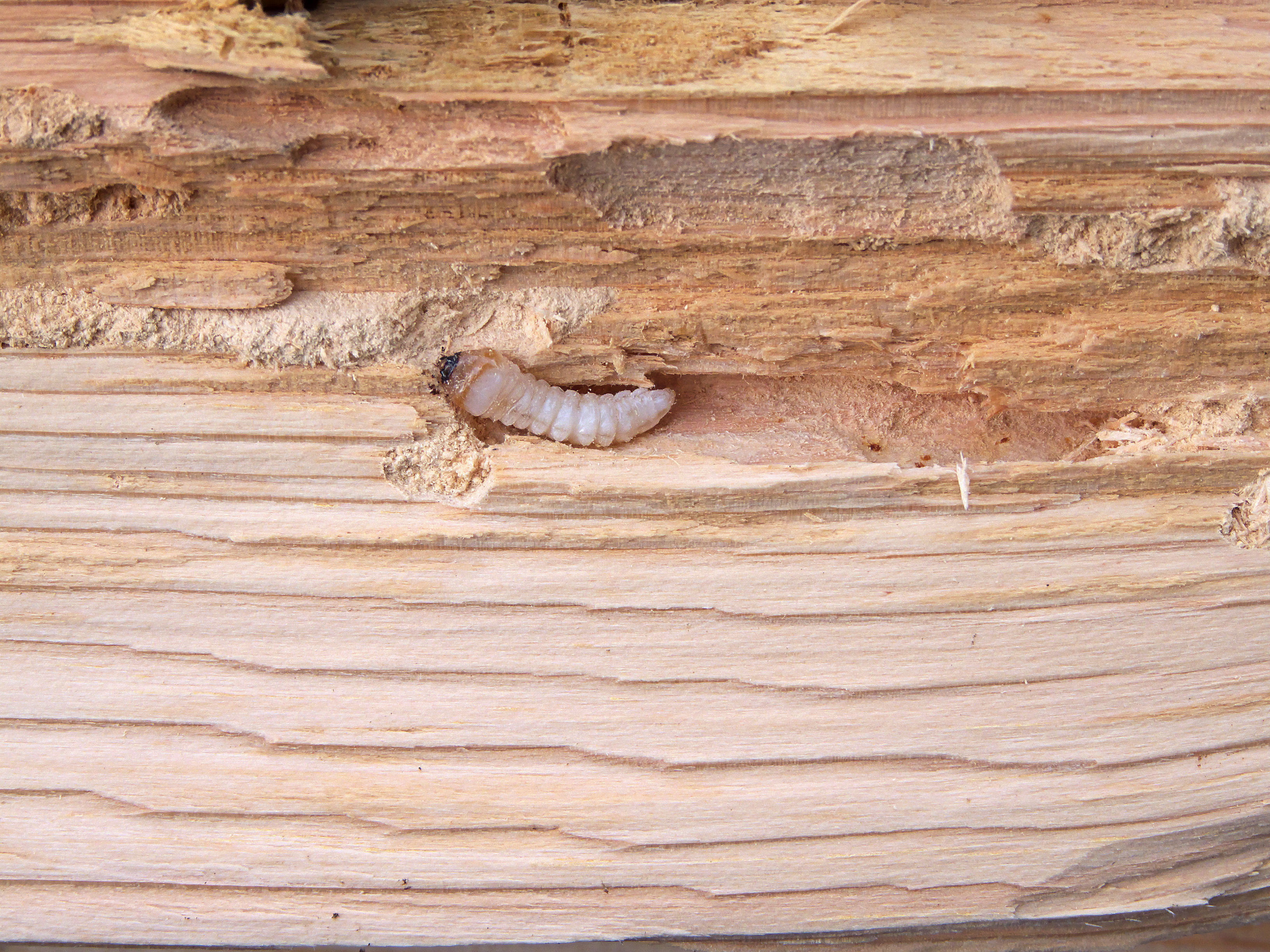 Hylotrupes bajulus (huisboktor) in grenenhout